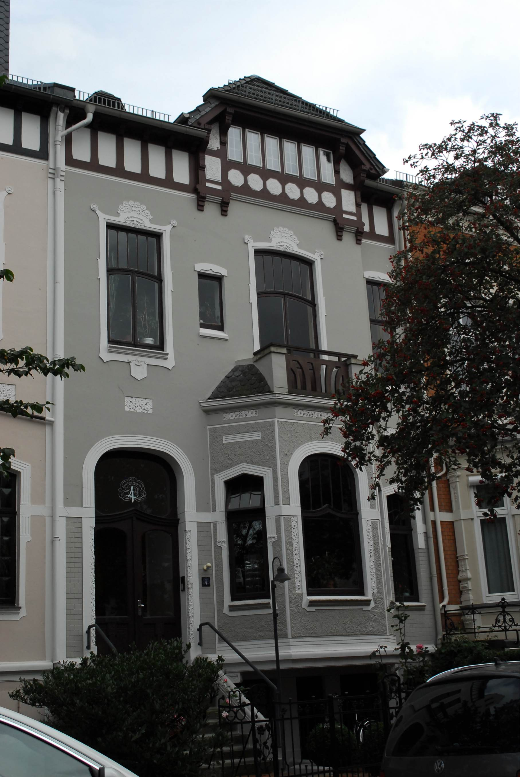 Wohnhaus in Bremen, Franz-Liszt-Straße 4.Das abgebildete Objekt ist ein geschütztes Kulturdenkmal in der Freien Hansestadt Bremen, mit der Nr. 0414 beim Landesamt für Denkmalpflege registriert.